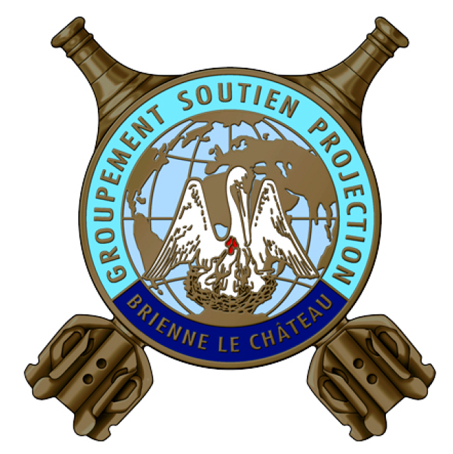 Héraldique : Obus de mortier au naturel de bronze en sautoir chargé d’un besant d’argent à la filière de bronze, à la bordure d’azur en plaine et de ciel en chef supportant en abîme une mappemonde au naturel chargé sur le tout d’un pélican de piété en son aire. Symbolique : Nous sommes en présence d'une vue d'artiste représentant la composante pyrotechnie du Groupement composés de deux éléments (obus et fusée) : • ailettes représentatives de l'obus de mortier de 60mm, • la fusée représentant la fusée percutante de 21/28. Et un blason central représentant un globe terrestre centrée sur les zones d’opérations françaises représentatif de l ’engagement de la compagnie dans une logique opérationnelle et projetable sur lequel repose un pélican de piété représentatif de la logistique opérationnelle réalisé par la compagnie.